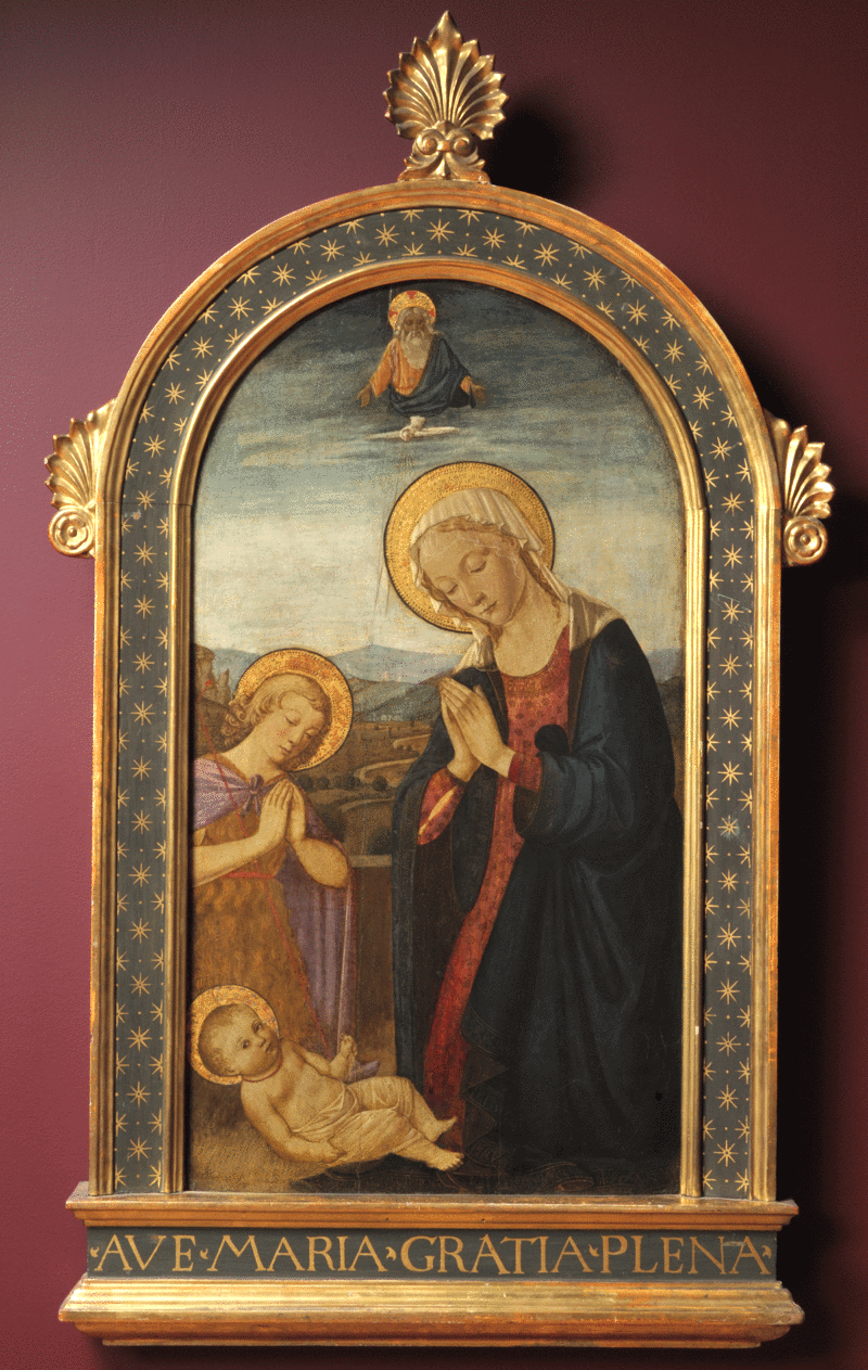 Vierge et saint Jean-Baptiste adorant l'Enfant Jésus, œuvre déposée au Musée des Beaux-Arts d'Angers dans le cadre MNR